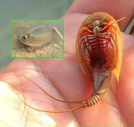 Triops cancriformis capturado en una charca temporal de Monteoscuro en Los Monegros (Zaragoza)